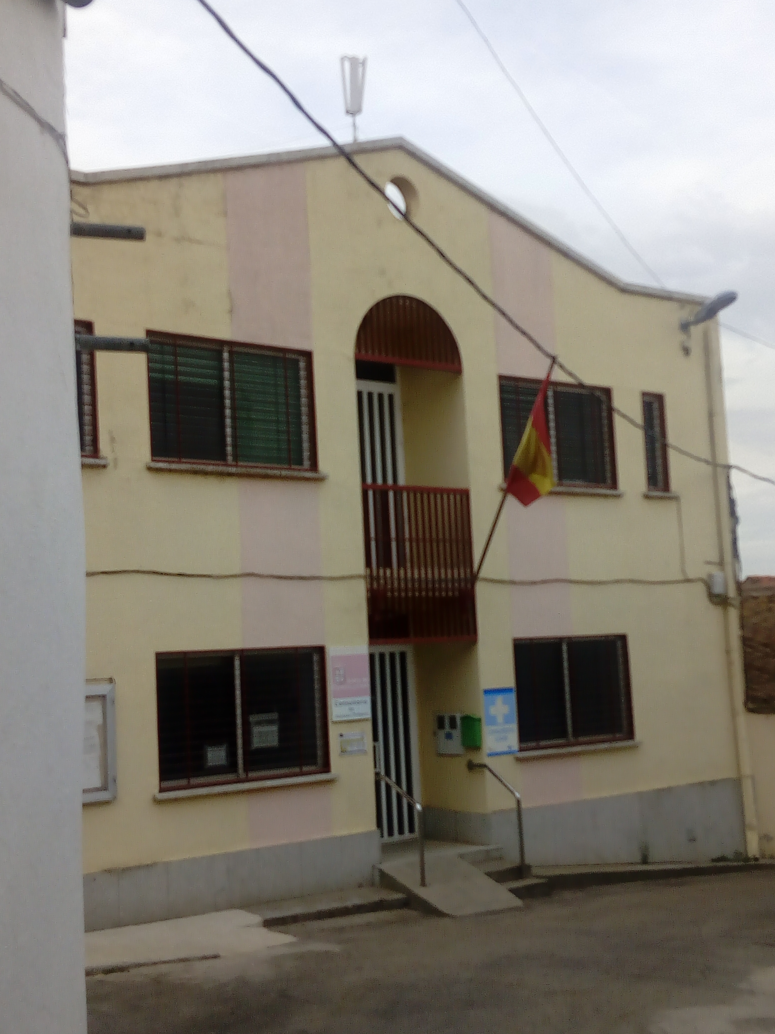 Ayuntamiento de El Pino de Tormes